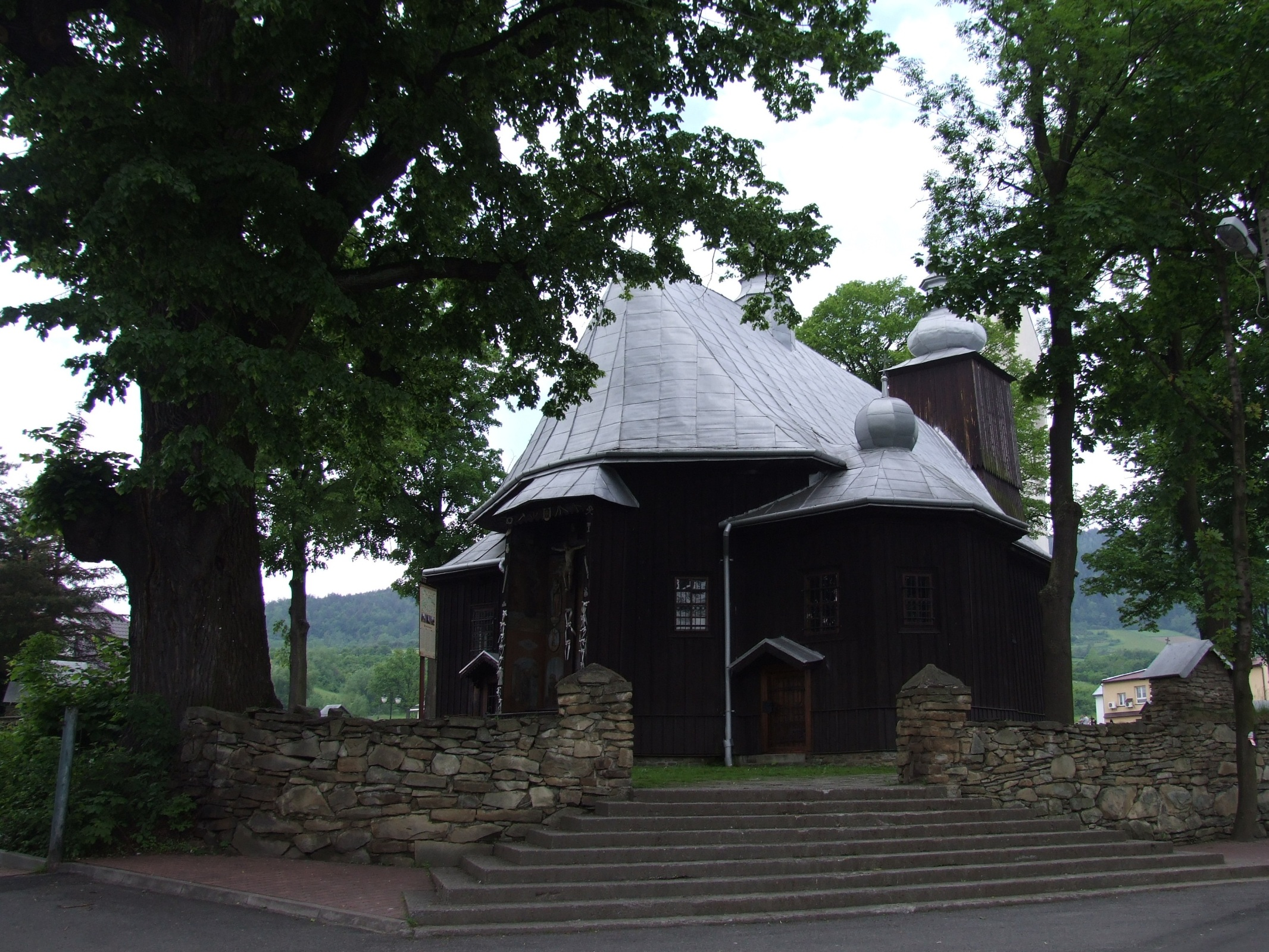 Stary kościół w Łukowicy